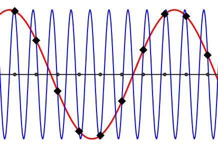 Deux signaux présentant exactement les mêmes échantillons